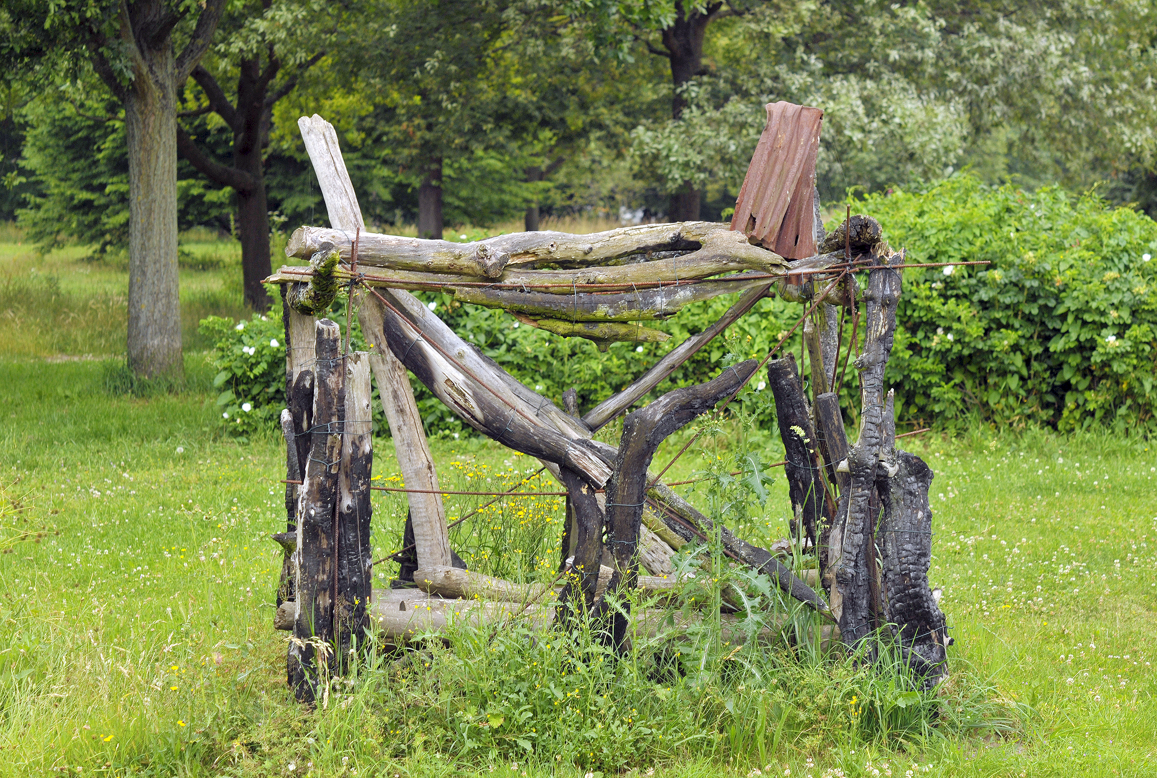 Der Hiroshima-Hain in Hannover wurde 1987 auf dem Gelände der früheren Pferderennbahn Alte Bult an der Eilenriede im Stadtteil Südstadt-Bult angelegt. Die 110 gepflanzten Kirschbäume erinnern an die 110.000 Soforttoten während des Atombombenabwurfs über Hiroshima am 6. August 1945. Am Eingang zu dem Hiroshima-Hain steht ein menschenleeres aus den Fugen geratenes, skelettiertes und ausgebranntes Zuhause aus angekohlten Baumstämmen und darüber ein in der Glut verschmortes und deformiertes Wellblechdach. Klaus-Dieter Kappenberg gestaltete diese Installation im Jahr 2000.